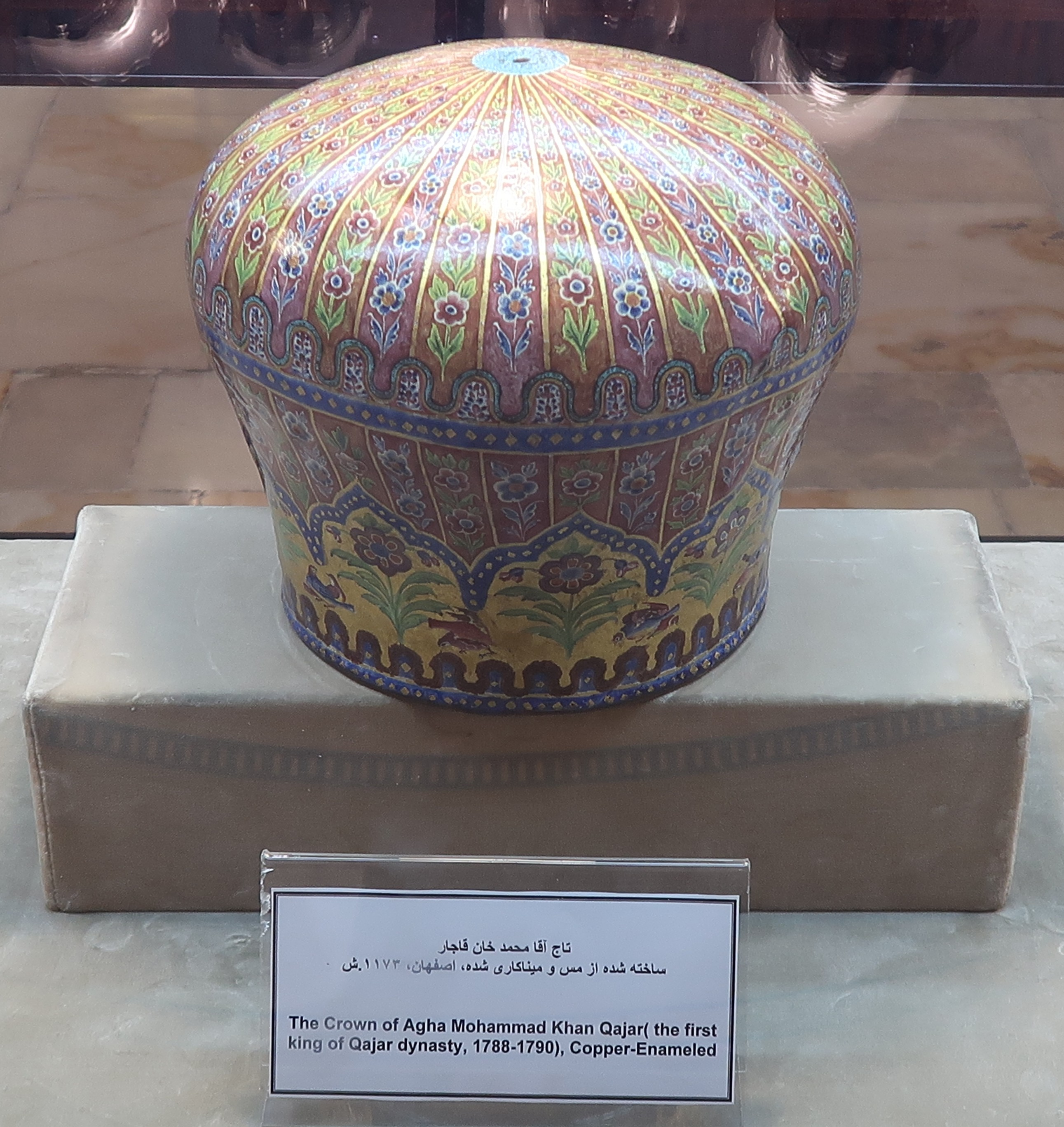 تاج آقا محمدخان قاجار